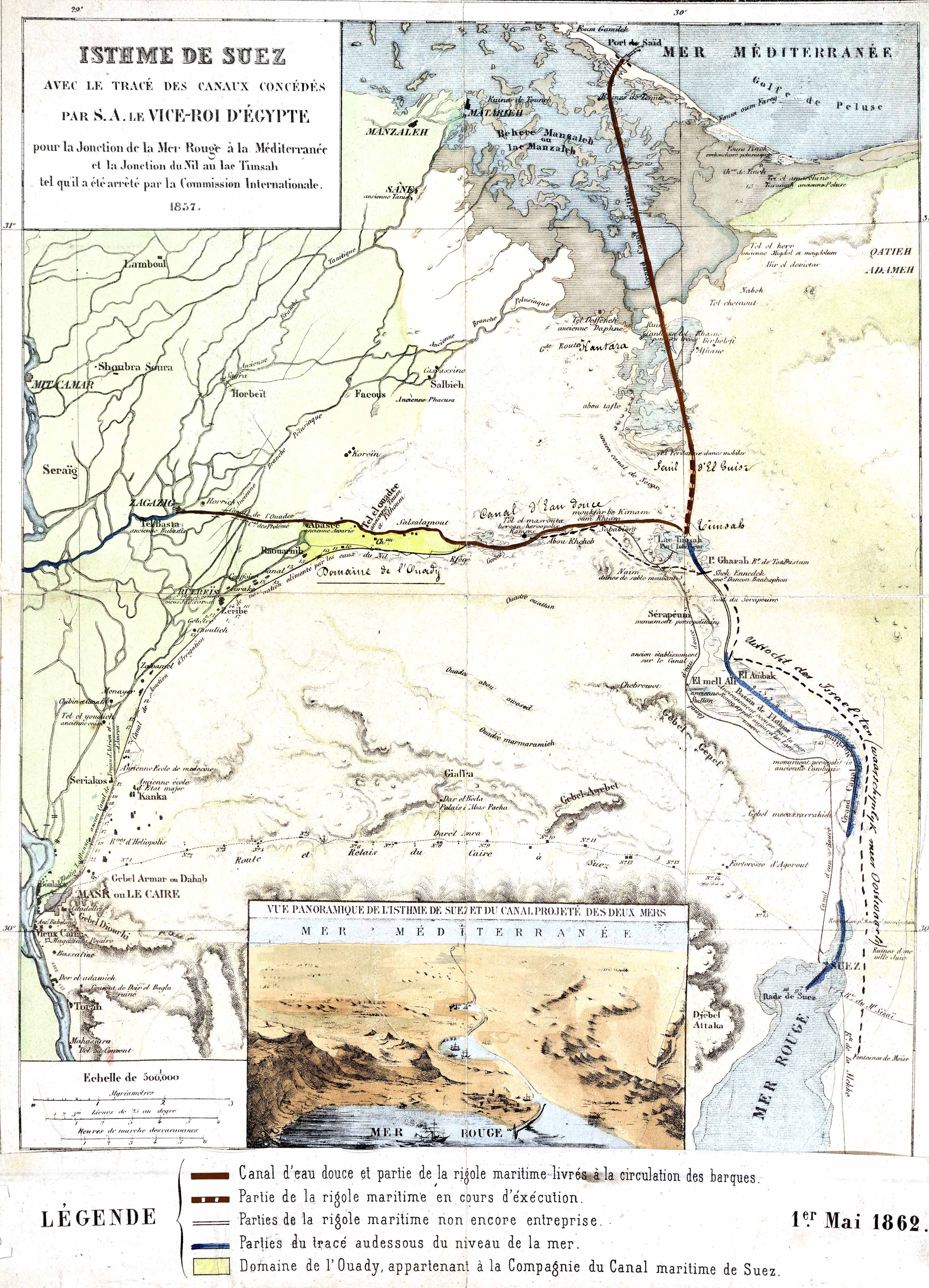 Isthme de Suez - Carte de 1857 avec mise à jour au premier mai 1862 de l'état des travaux du canal.